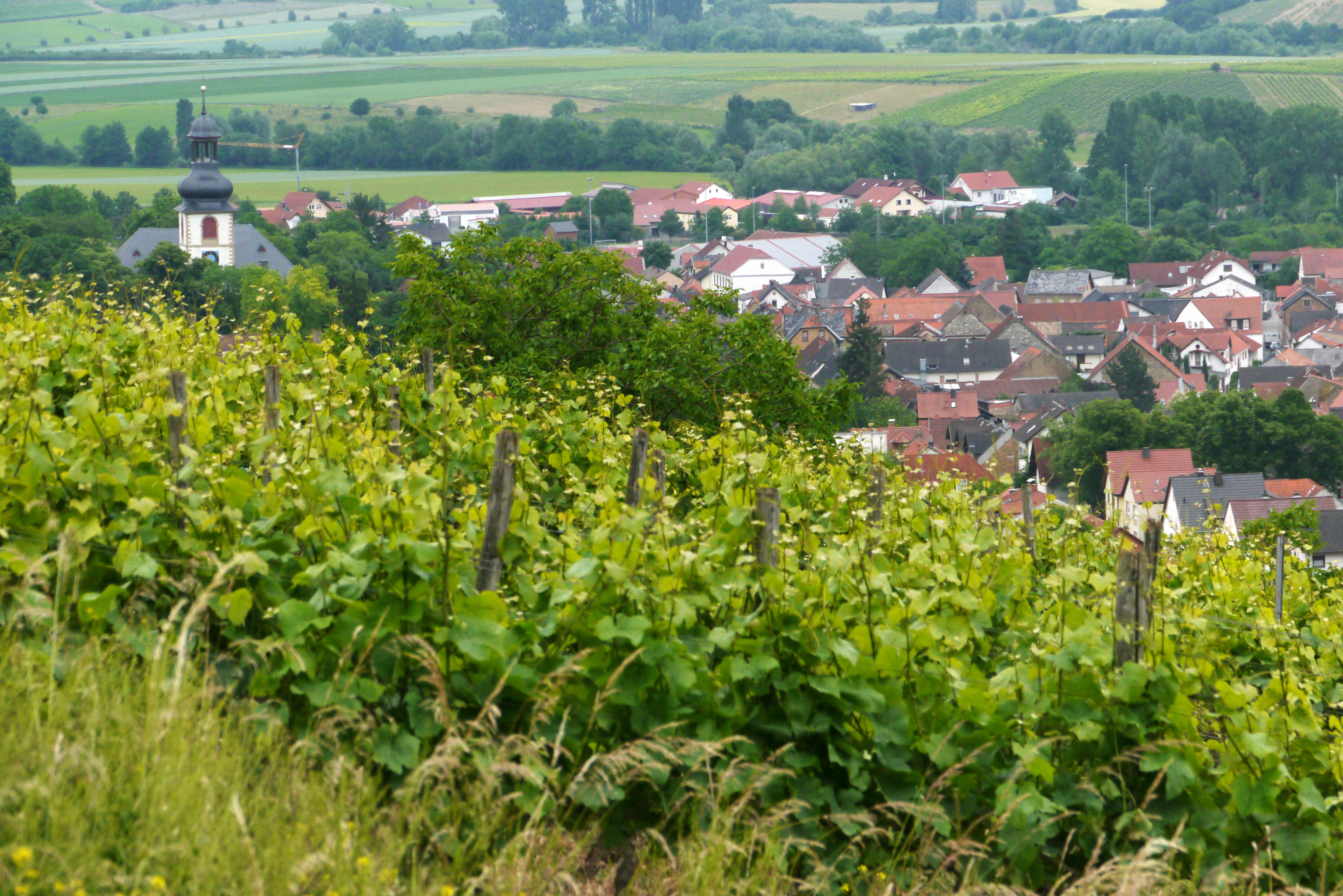 Jugenheim in Rheinhessen - Ortsansicht